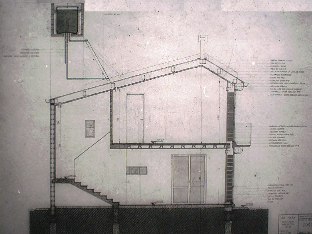 Corte longitudinal de la Casa Solar de La Plata localizada en La Plata (526 y 15), Buenos Aires, Argentina. Diseño del IAS - Instituto de Arquitectura Solar dirigido por el Arq. Elias Rosenfeld. Construcción finalizada en 1980. (Reproducción de plano de obra)